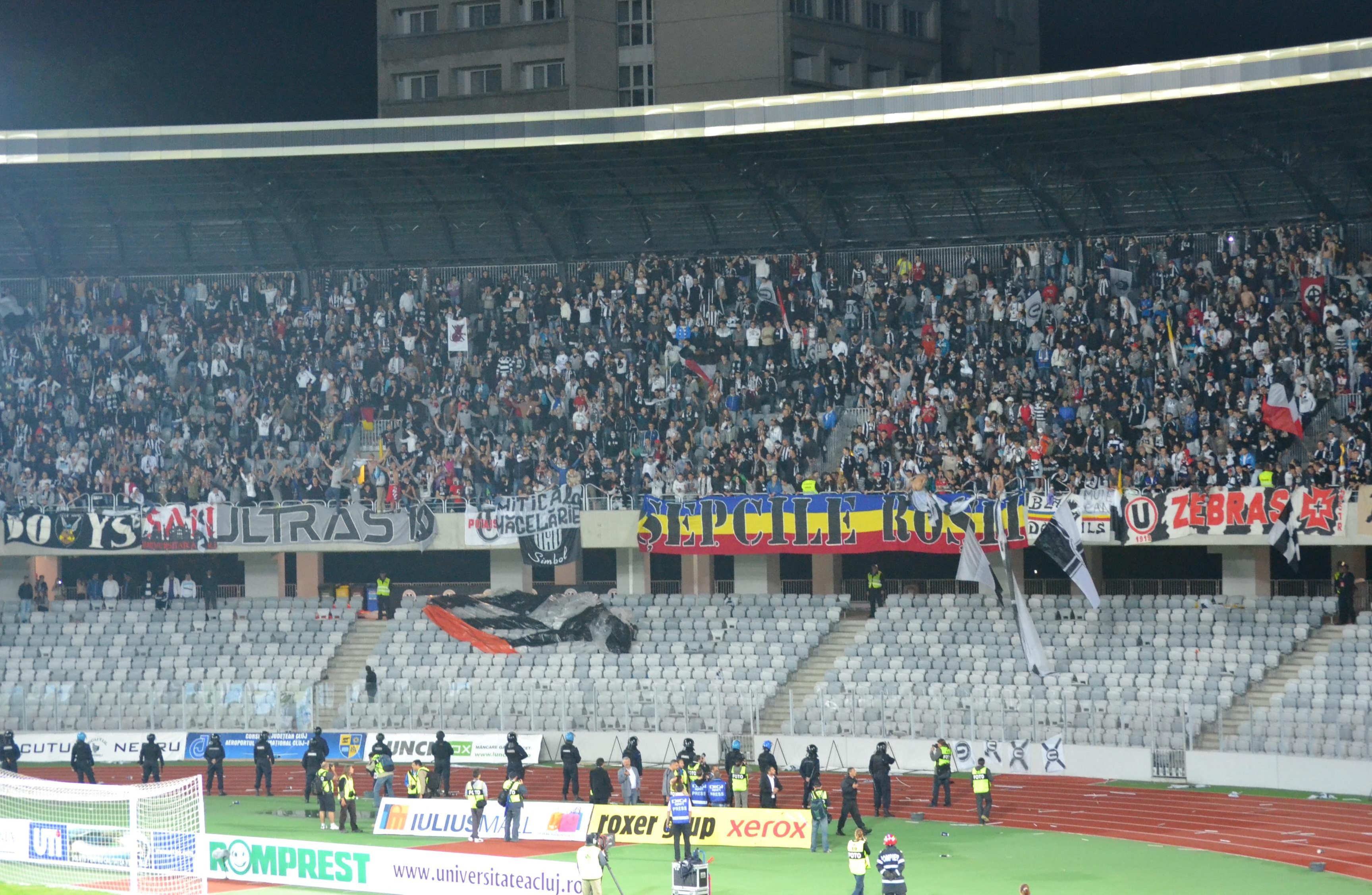 sezon 2011-2012